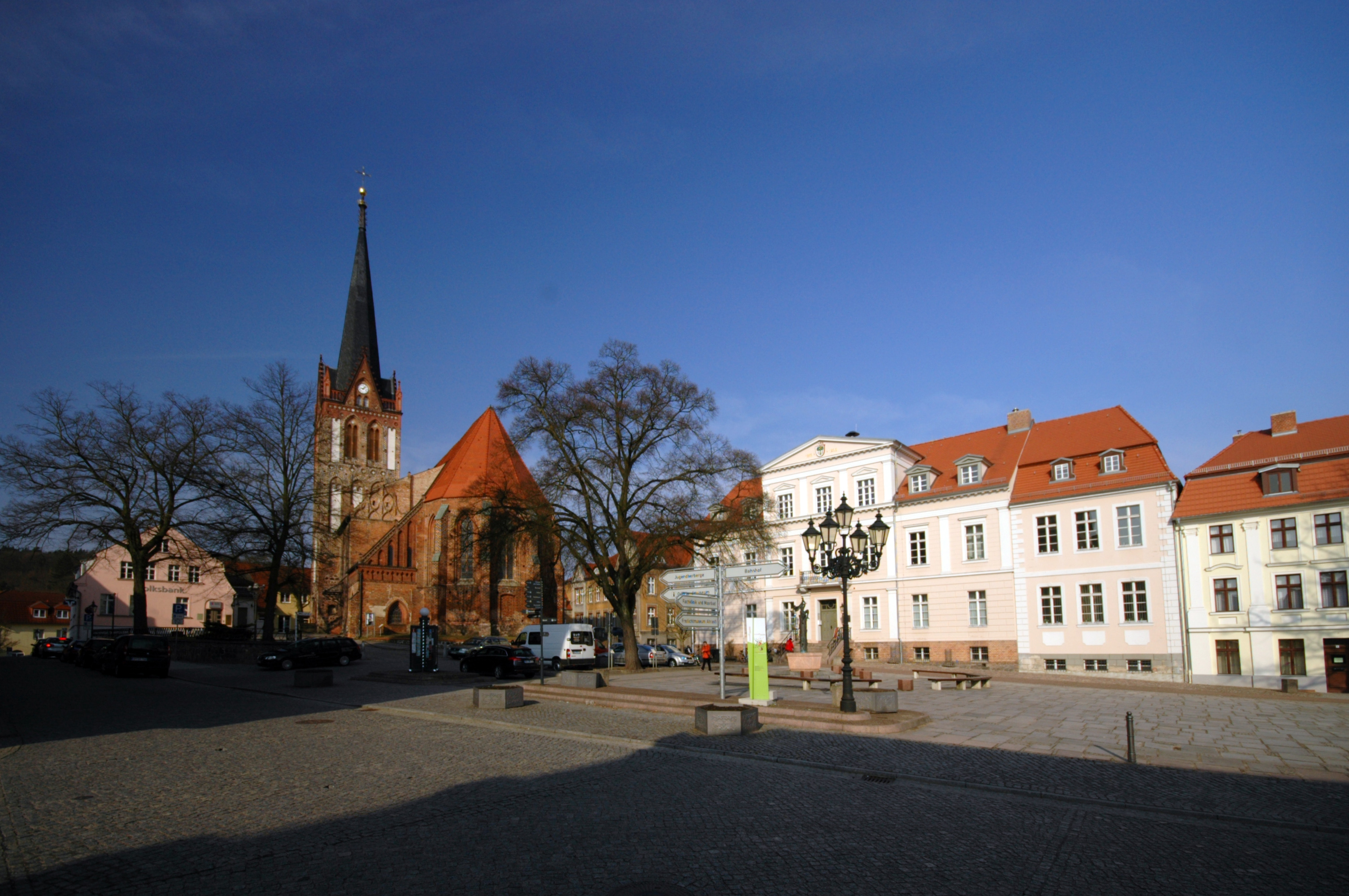 Bad Freienwalde - St. Nikolai-Kirche und Rathaus